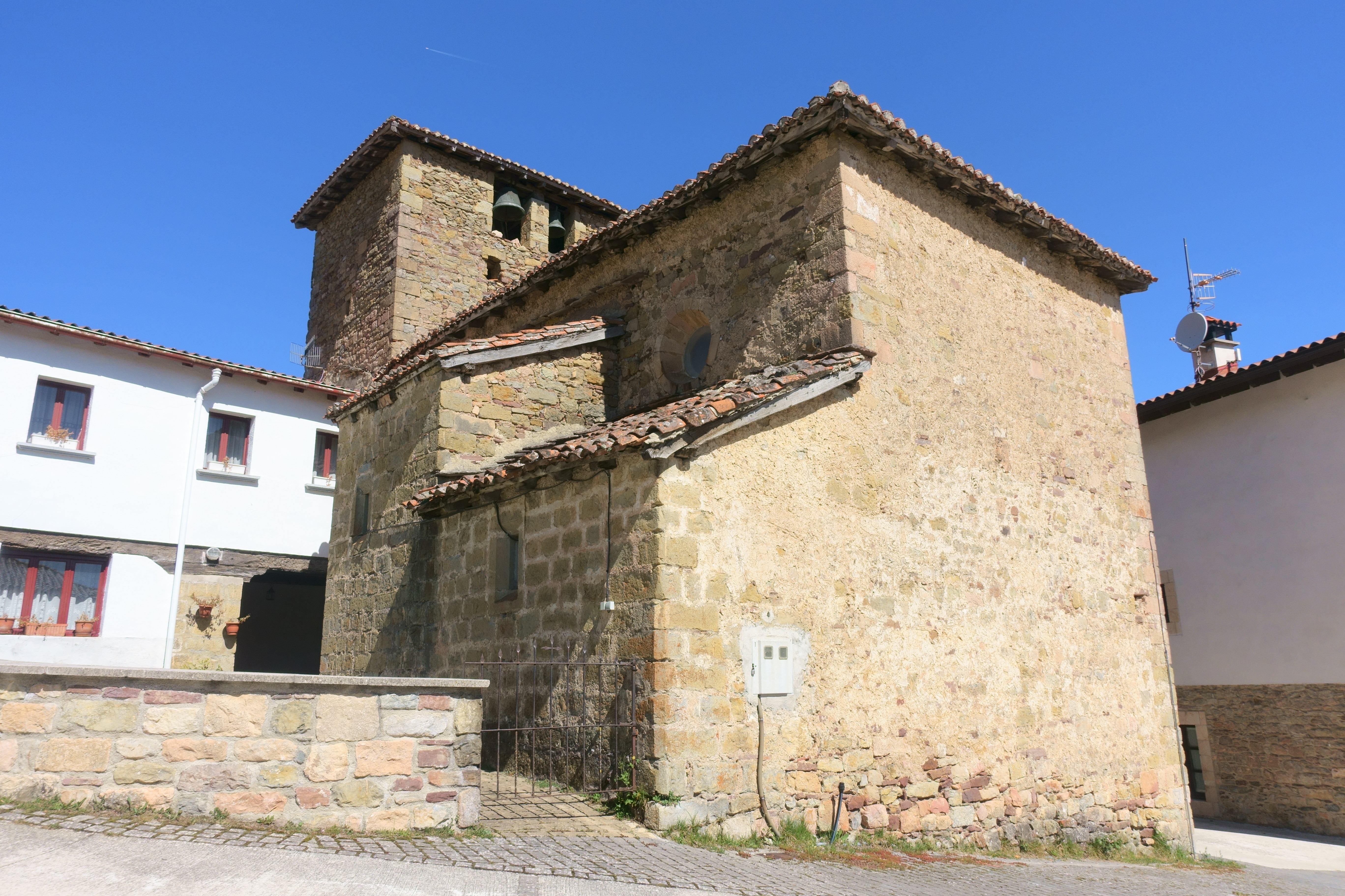 Iglesia de San Juan Bautista en Saragüeta (Arce, Navarra).